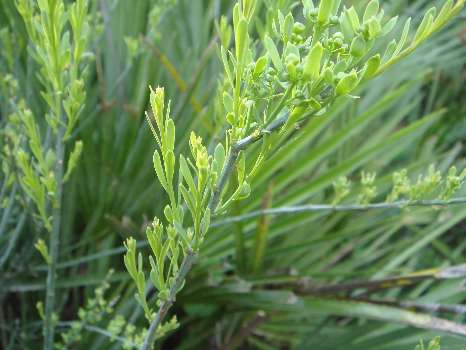 Osyris alba, El Bosque, Cádiz, España